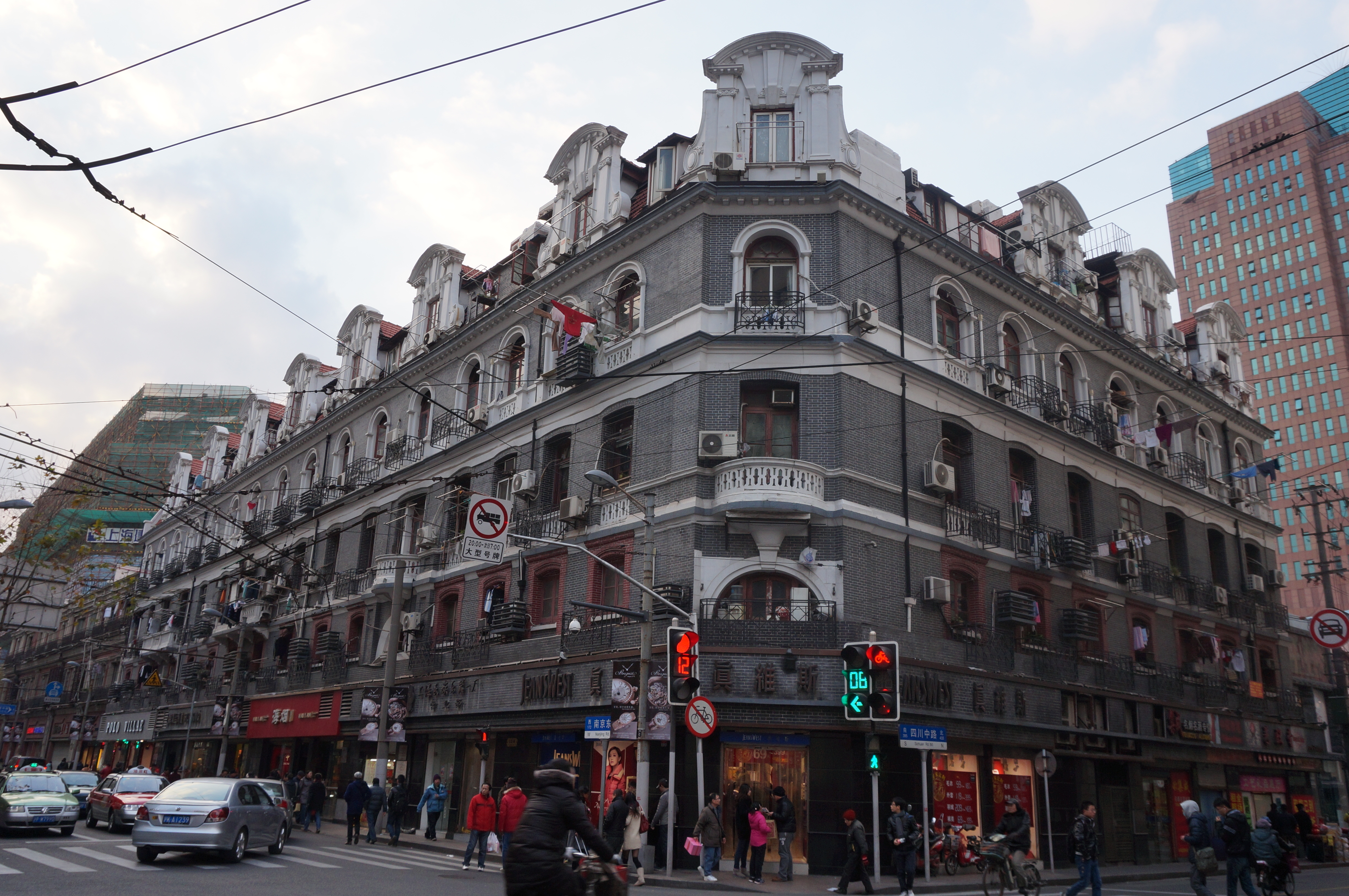 上海市第三批优秀历史建筑——慈安里大楼